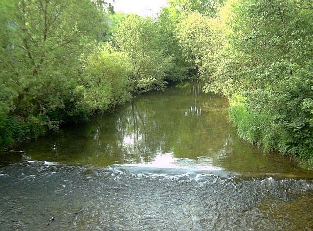 Der Fluss Lenne in Schmallenberg (NRW) Höhe Kurpark,Germany